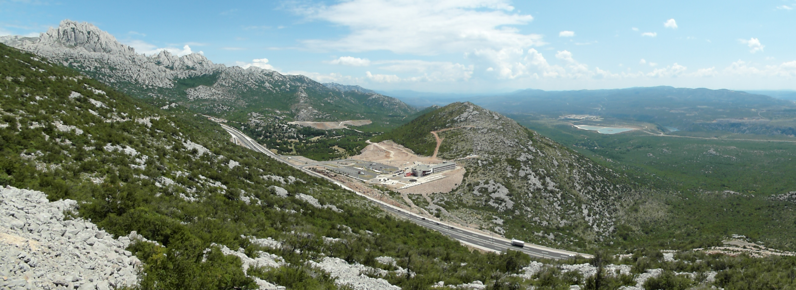 DIAĽNICA S HOTELOM - HIGHWAY WITH THE HOTEL